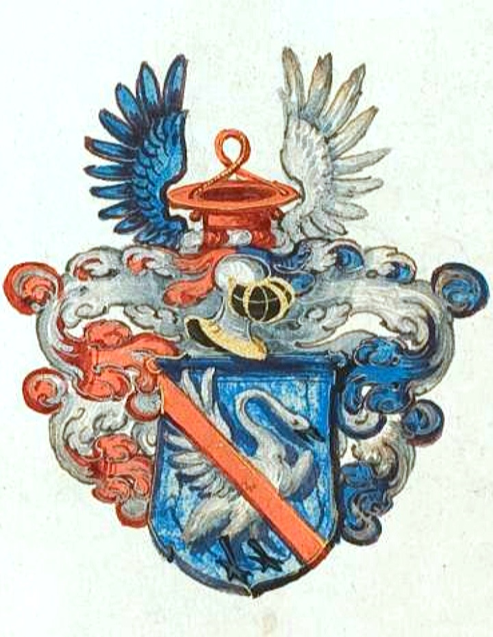 Wappen derer von Dieskau, konkret dargestellt im Auftrag von Rudolf von Dieskau, kursächsischer Rat, im Dreißigjährigen Krieg auch Kriegskommissar,ab 1628 Mitglied in der Fruchtbringenden Gesellschaft (Gesellschaftsname: "Der Niedrige"), * 5. Februar 1593; † 20. Juli 1656 in Dresden)